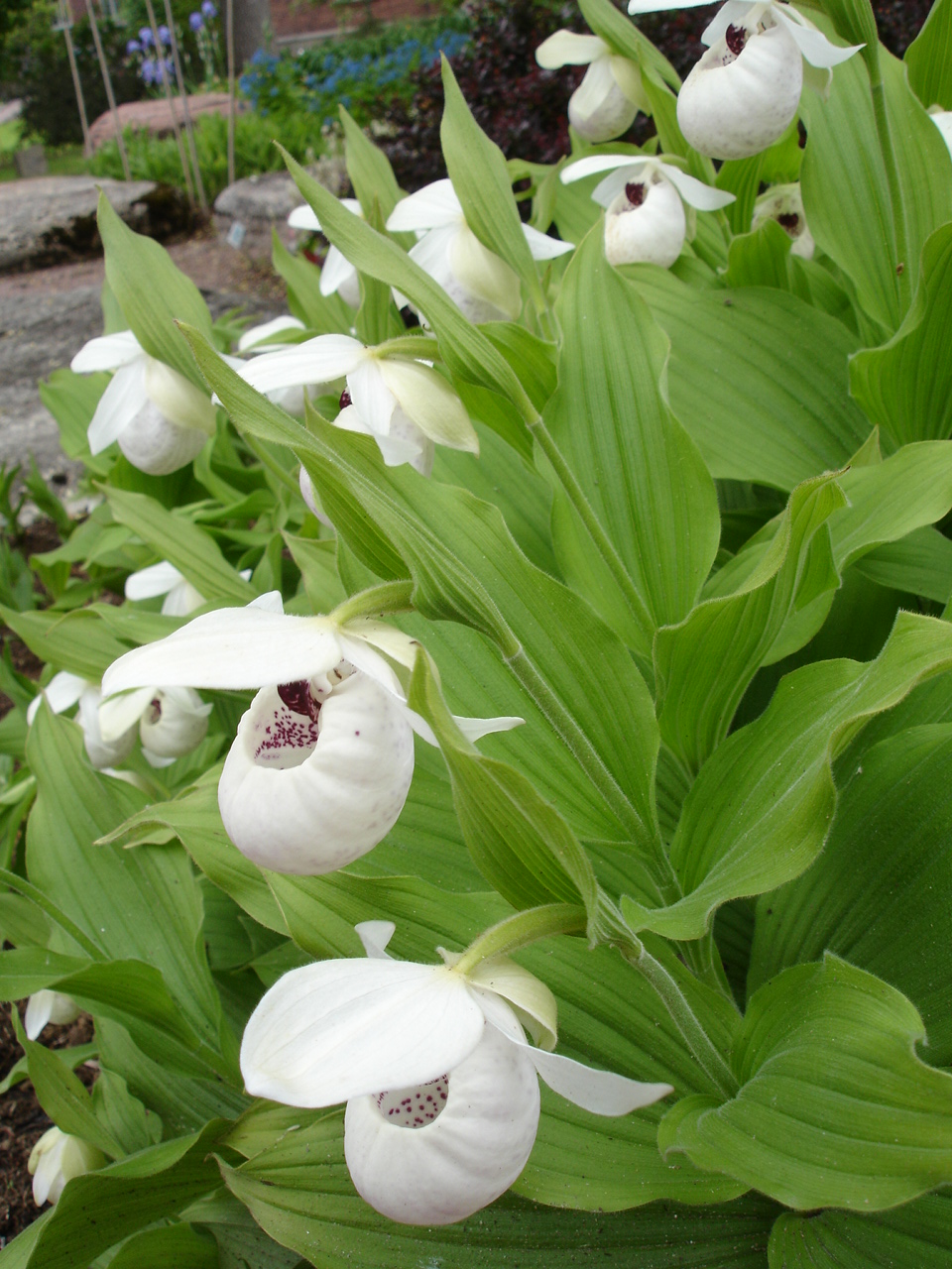 Cypripedium reginae